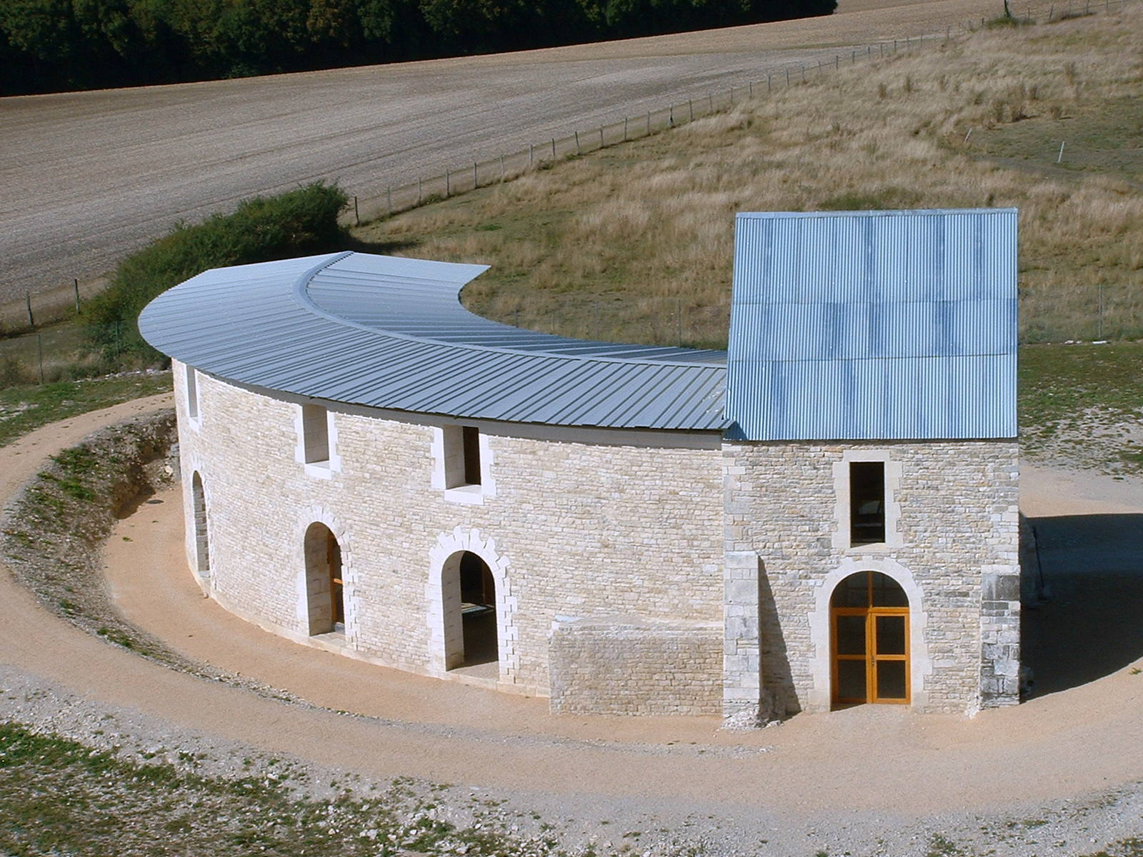 Château de Maulnes, Cruzy-le-Châtel, Yonne - le bâtiment des communs